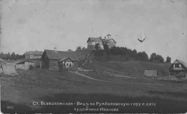 Вид на Румболовскую гору и дом художника Иванова